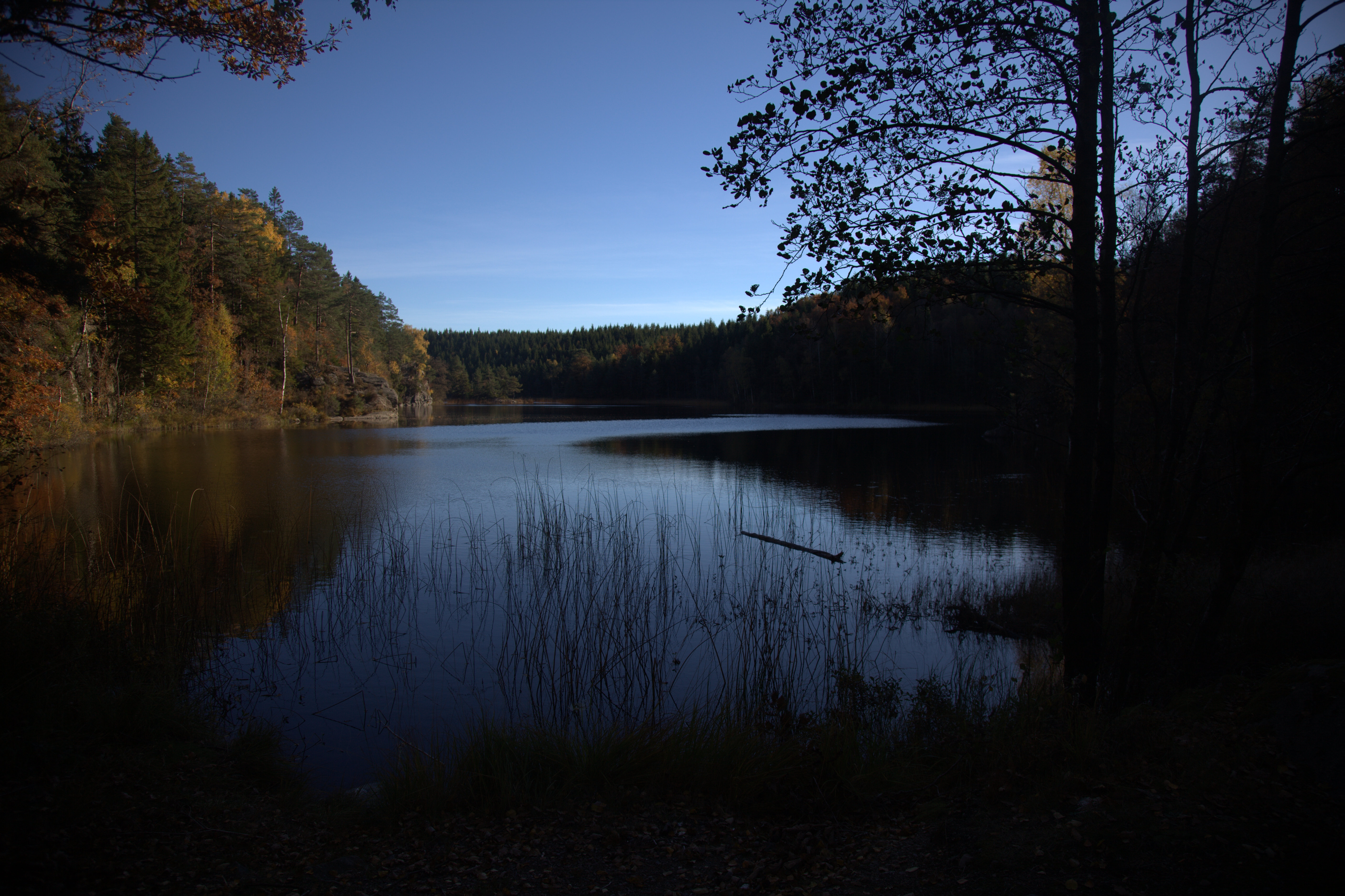 Timmervatten i Kungälvs kommun